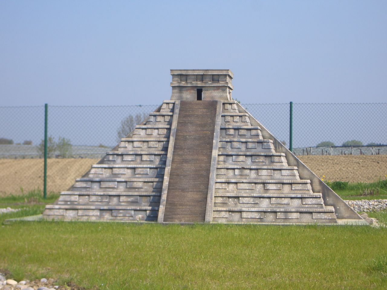 Meckenbeuren, Mini Mundus Bodensee, Pyramide „El Castillo“ in Chichén Itzá, Mexiko